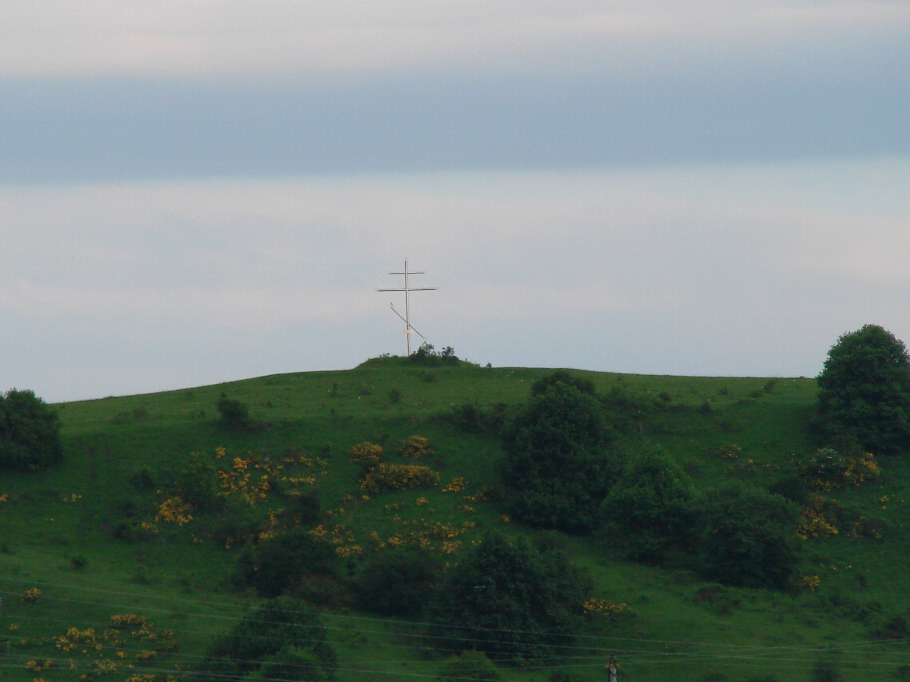 Zelenchukskaya, Karachay-Cherkessia, Russia